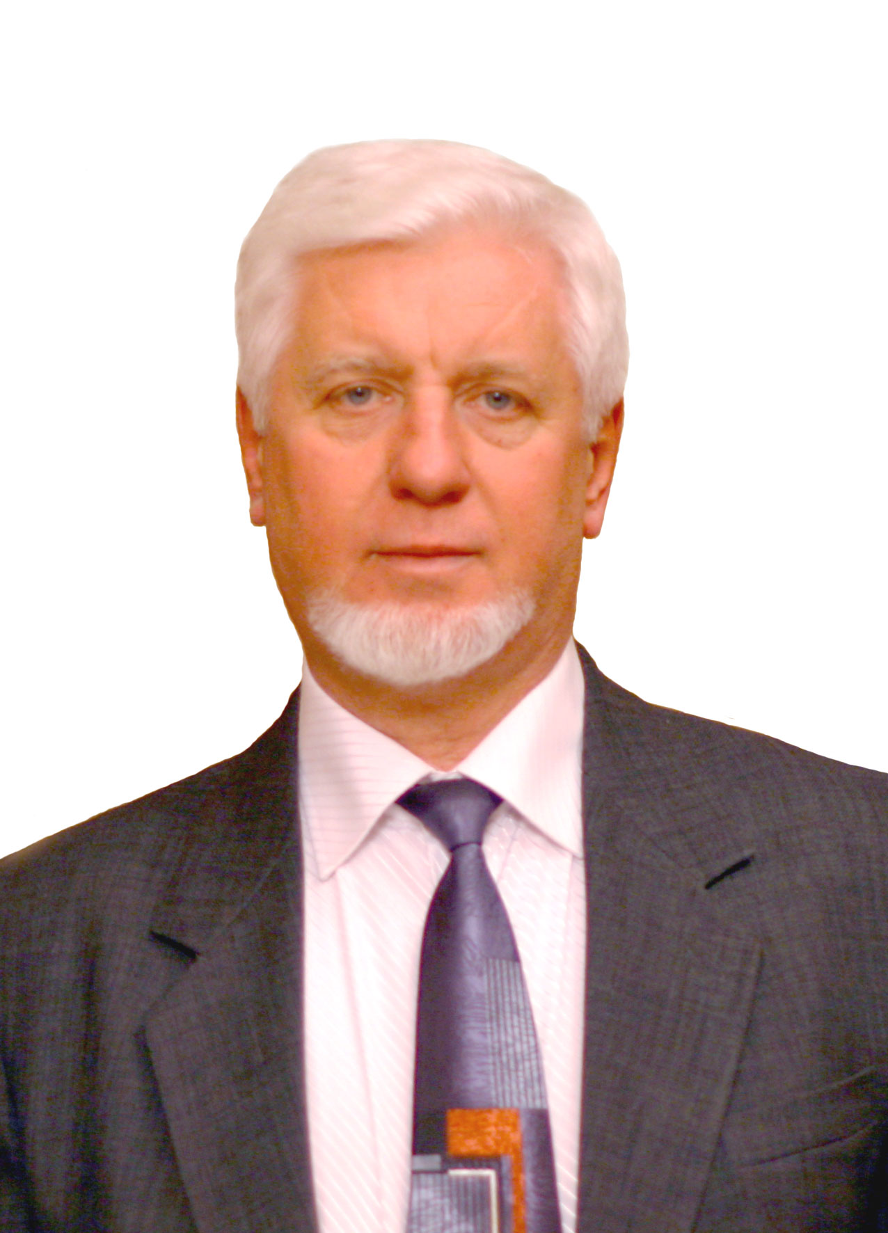 Пирогов Володимир Леонідович